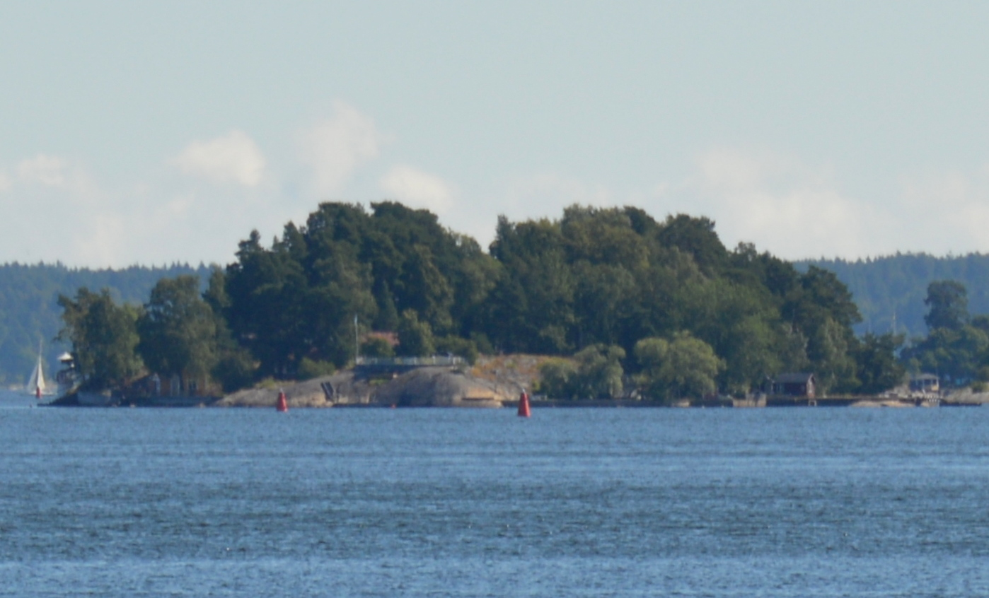 Insel Kungsborg